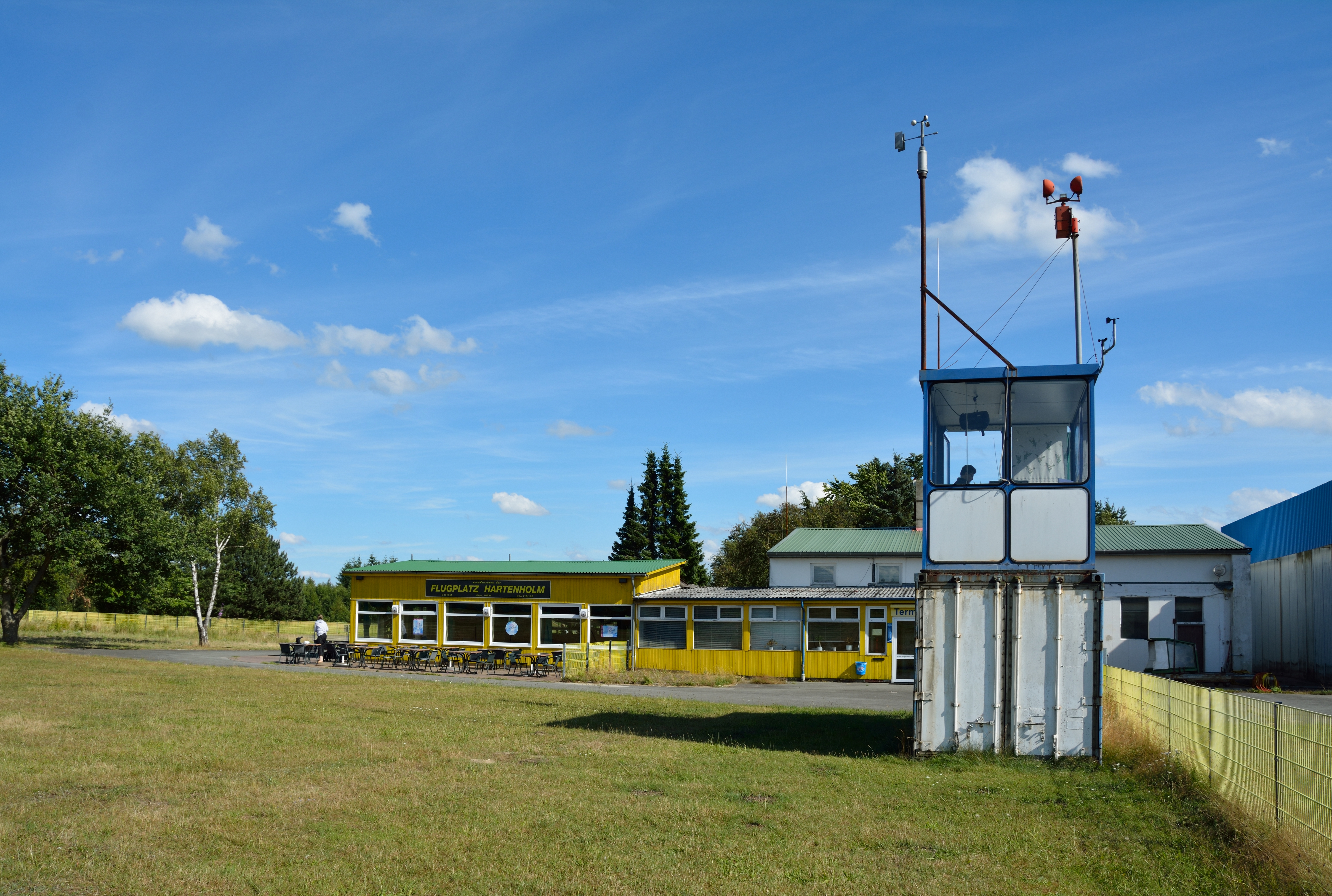 Der Flugplatz Hartenholm in der Gemeinde Hasenmmoor